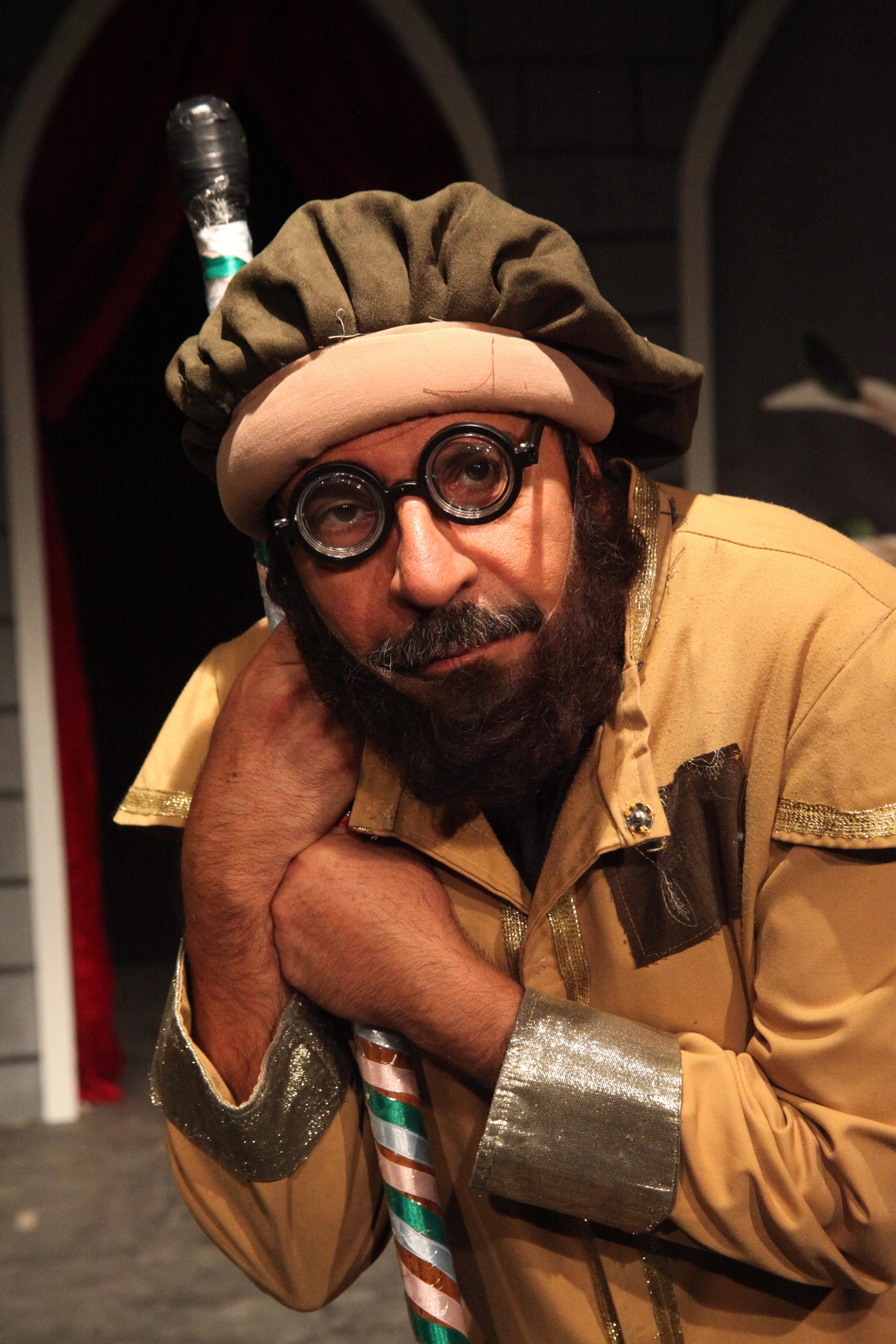 ممثل مسرحي